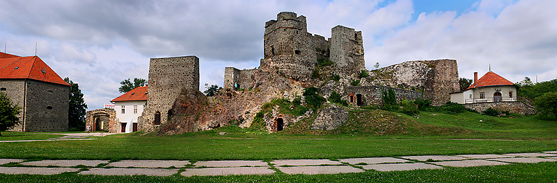 Lévai vár.